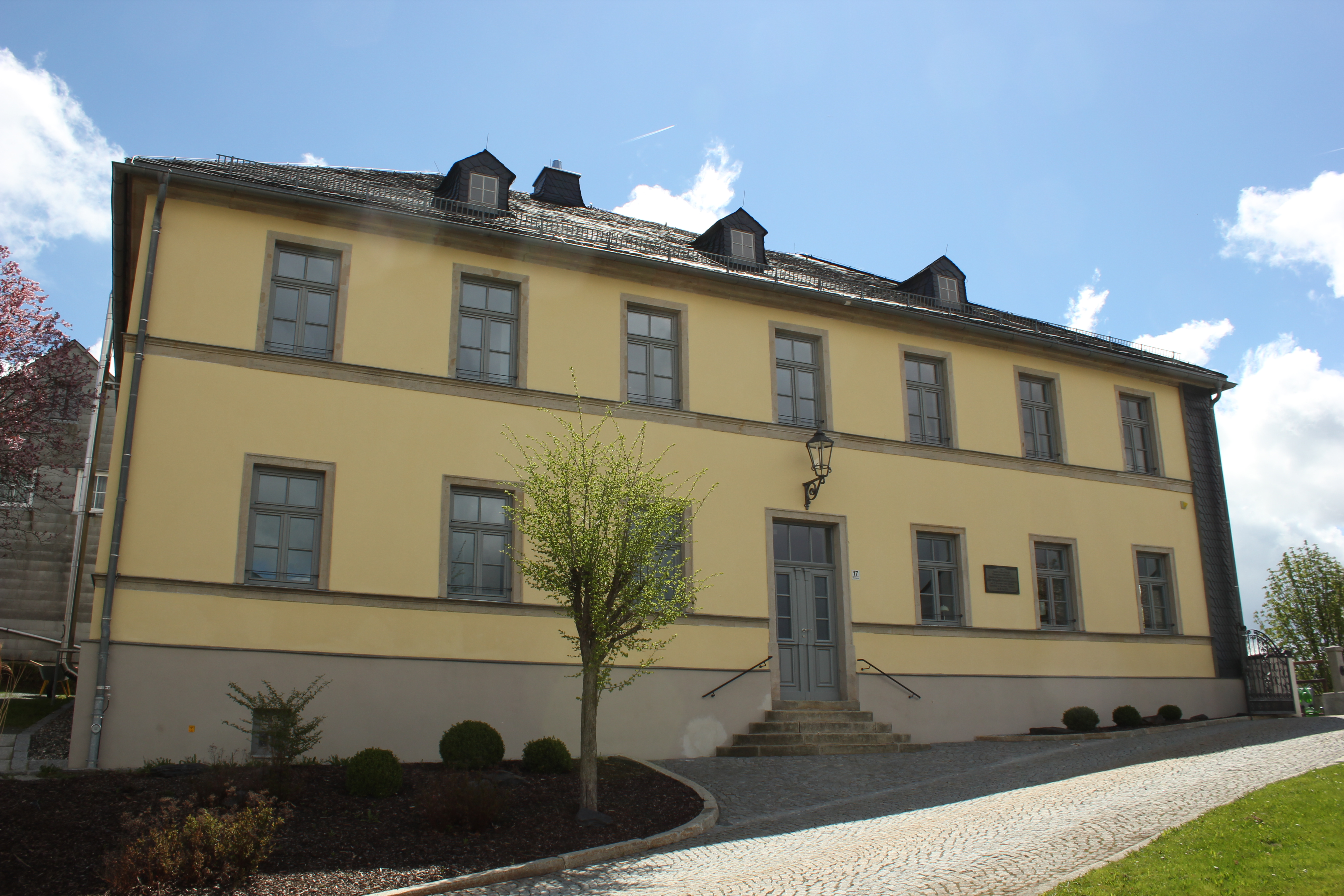 Schwarzenbach am Wald Marktplatz 17